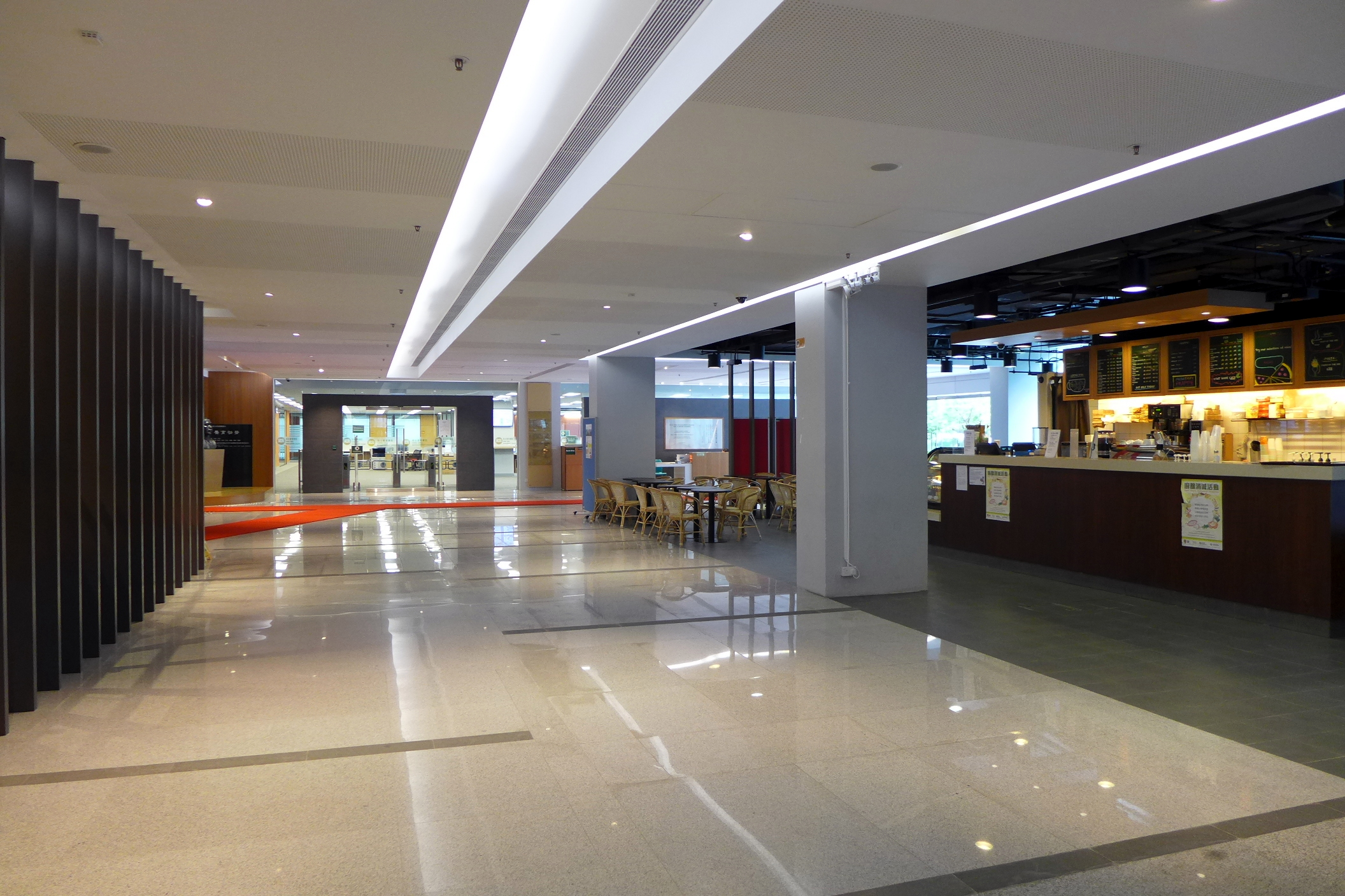 Hang Seng Management College